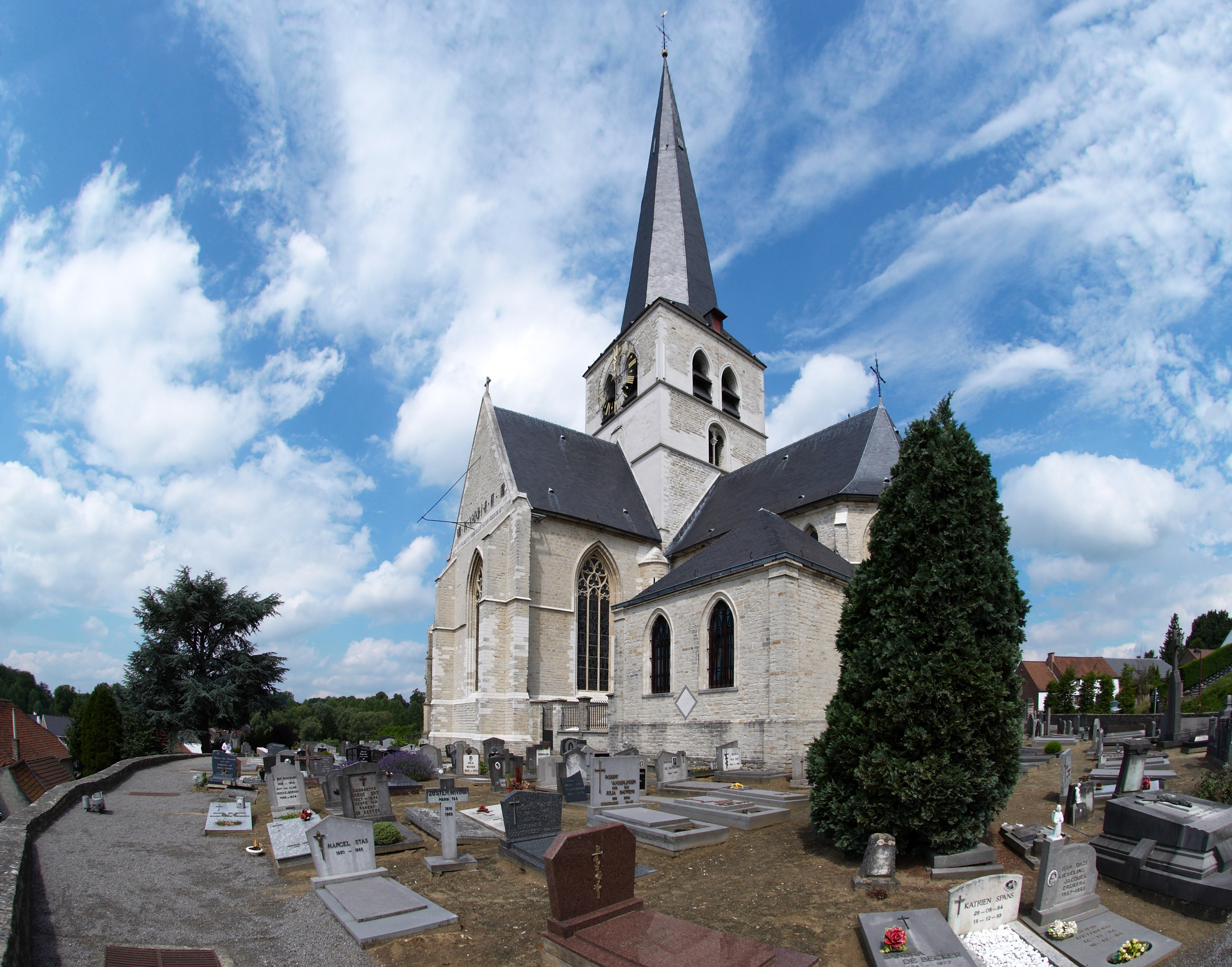 Onze-Lieve-Vrouwekerk te Huldenberg, België. For a 360° panoramic view see: full 360° horizontal panorama - Google Maps - Google Earth